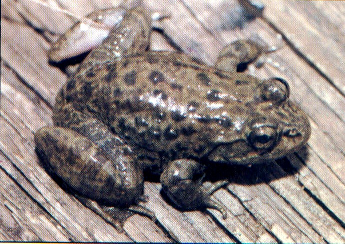 Paa hazarensis